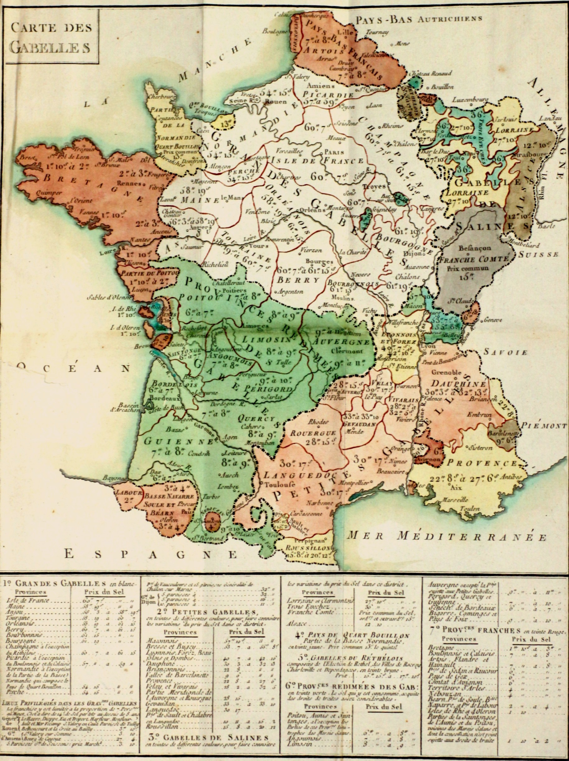 Carte des Gabelles in Compte Rendu au Roi de Necker, Paris 1781 Ancien regime salt tax map.